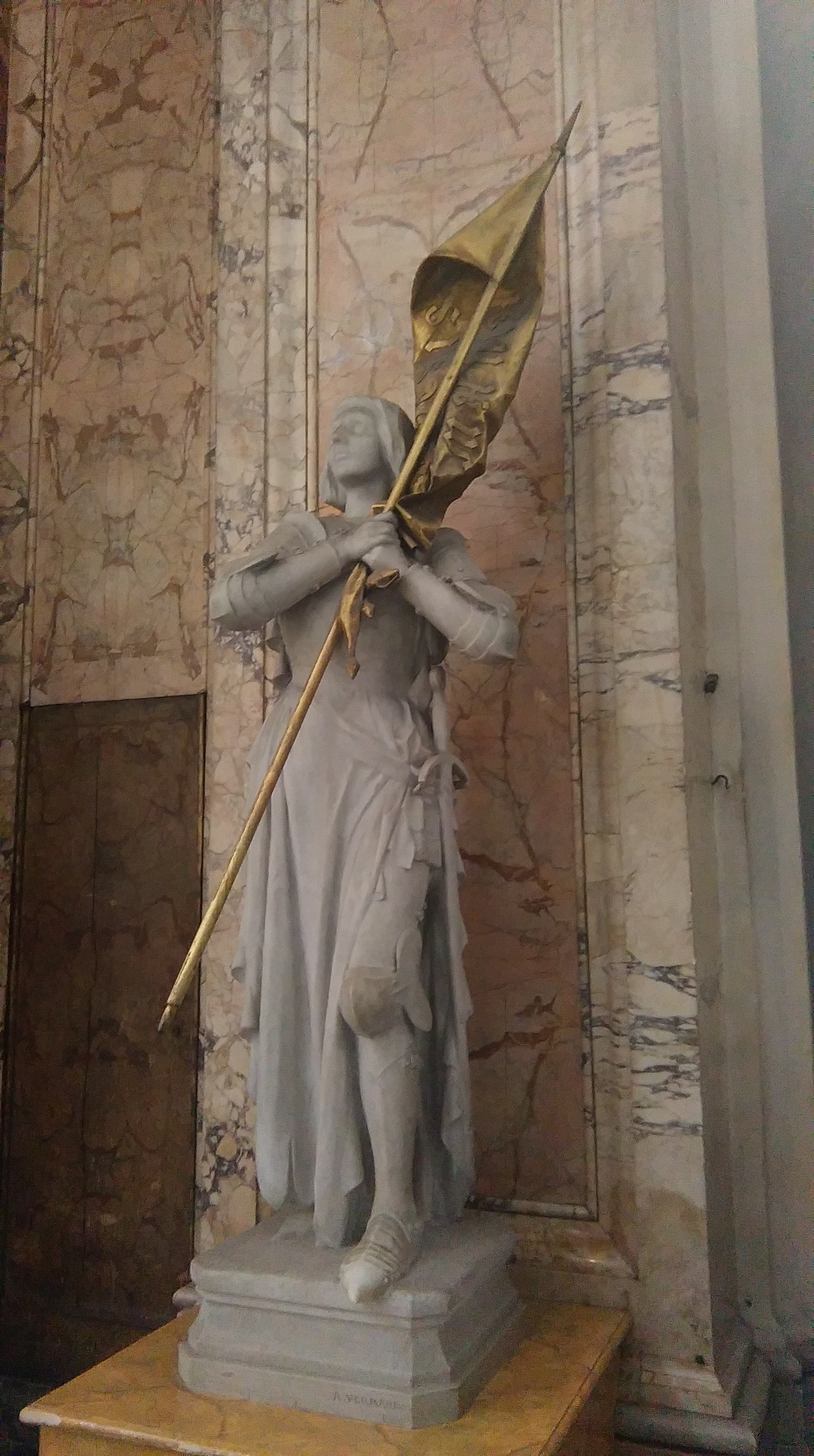 Statue de Jeanne d'Arc à Saint-Louis-des-Français-de-Rome, signée Vermaere.